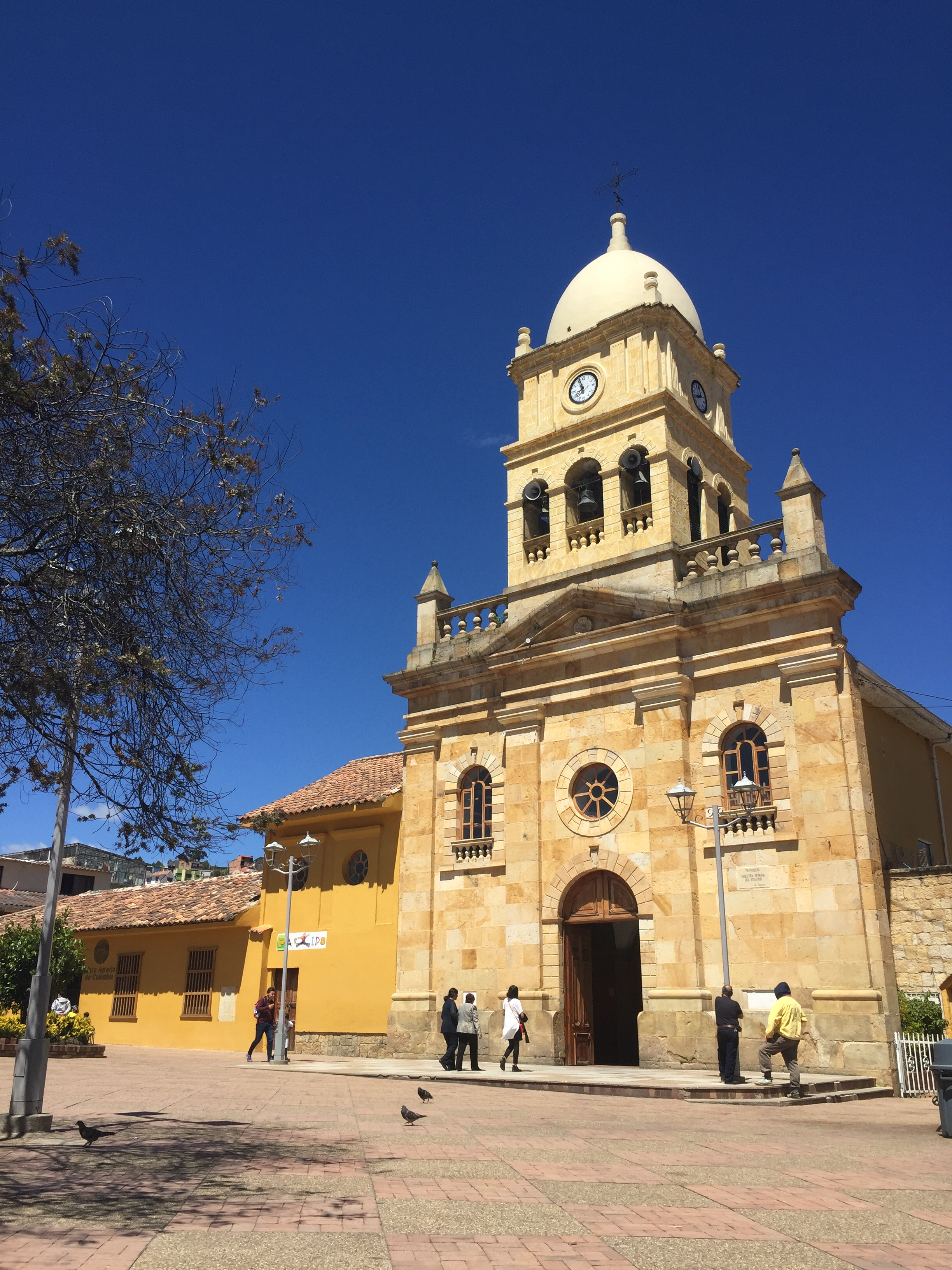 Parque principal